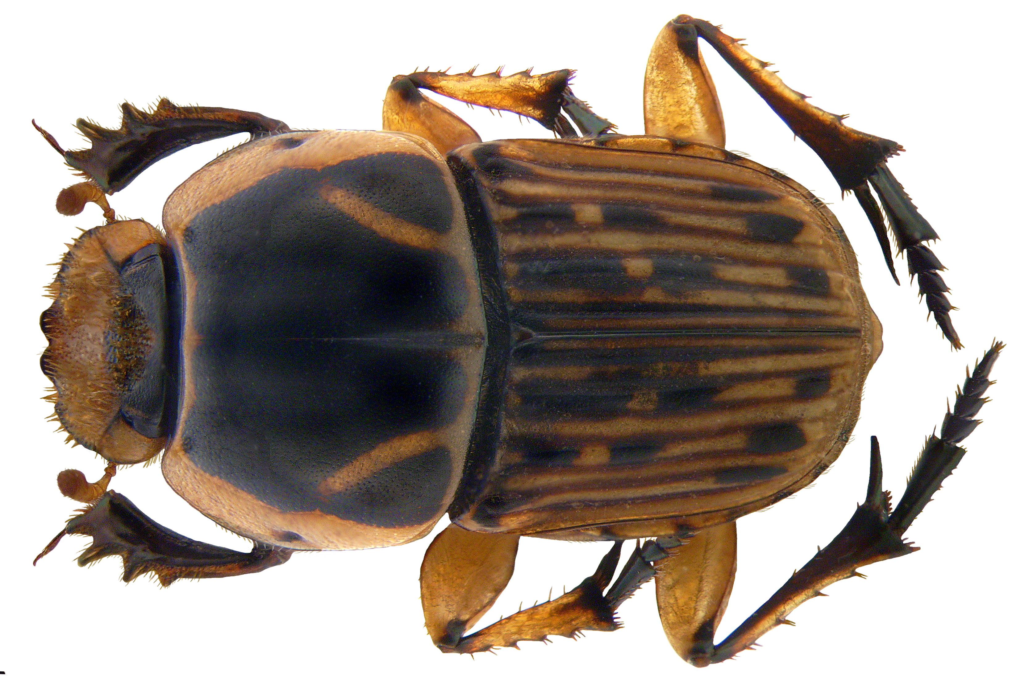 Familie: Scarabaeidae Grösse: 11 mm Fundort: Kenia, Tsavo National Park leg.det. U.Schmidt, 1991 Foto: U.Schmidt, 2009